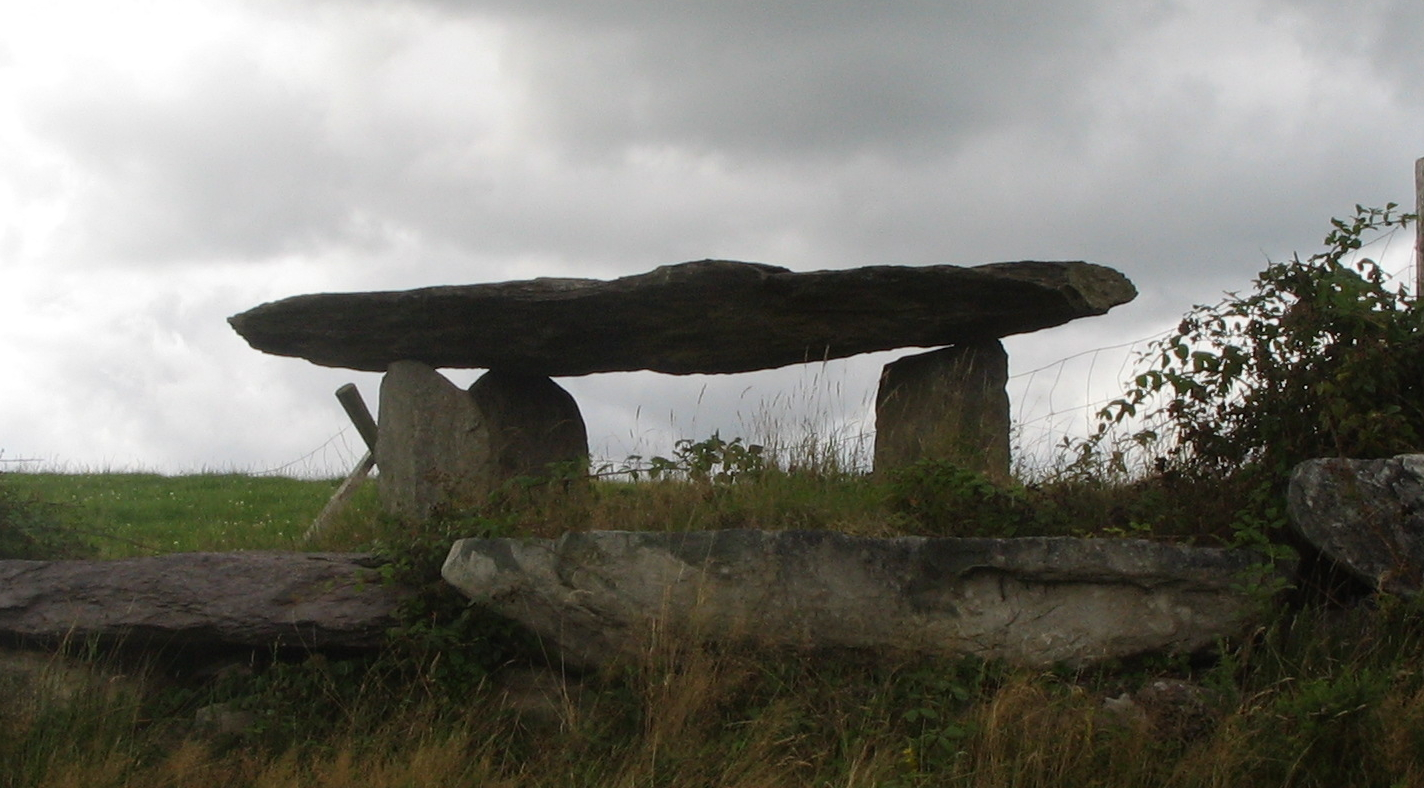 Summary Knocknakilla Dolmen